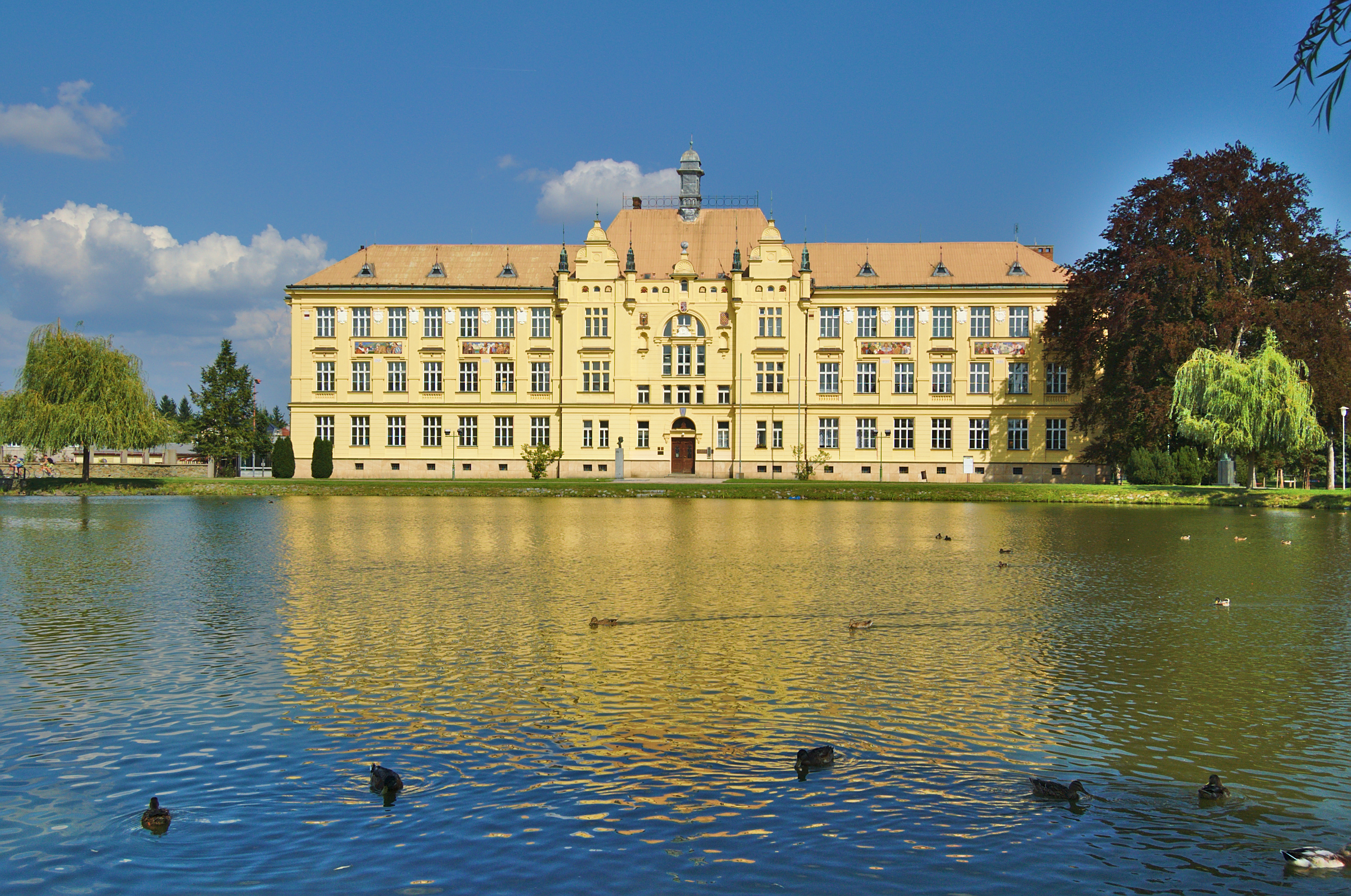 Gymnázium Jana Opletala, Litovel, okres Olomouc